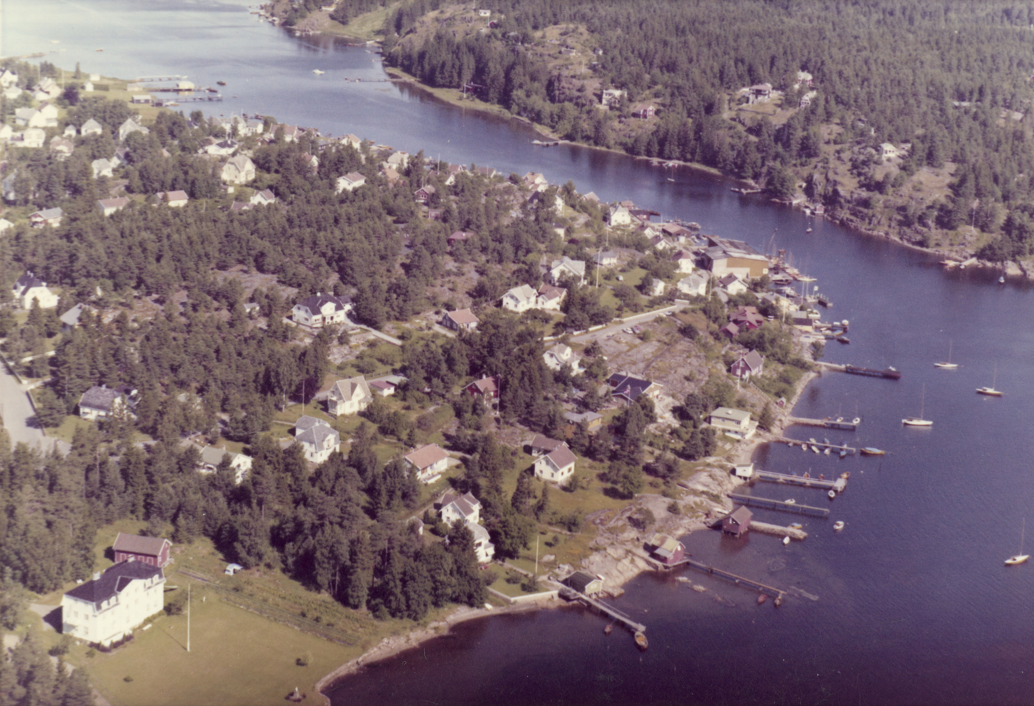 WF.S.185186